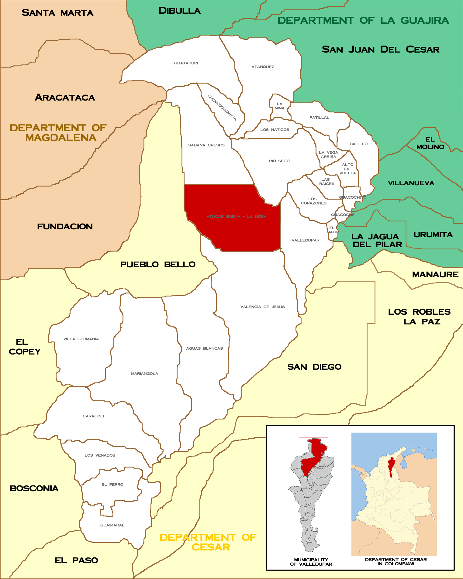 Map of Corregimientos of Valledupar, Azucar Buena / La Mesa